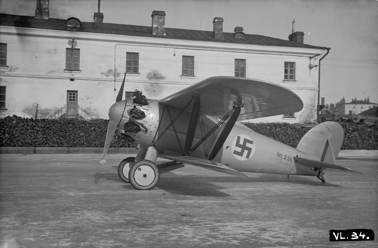 I.V.L. D.26 Haukka I HA-39 Suomenlinnassa Ilmailuvoimien Lentokonetehtaalla. Haukka oli Ilmailuvoimien Lentokonetehtaan pääsuunnittelijan, insinööri Kurt Bergerin suunnittelema kaksitasoinen hävittäjälentokone vuodelta 1927.